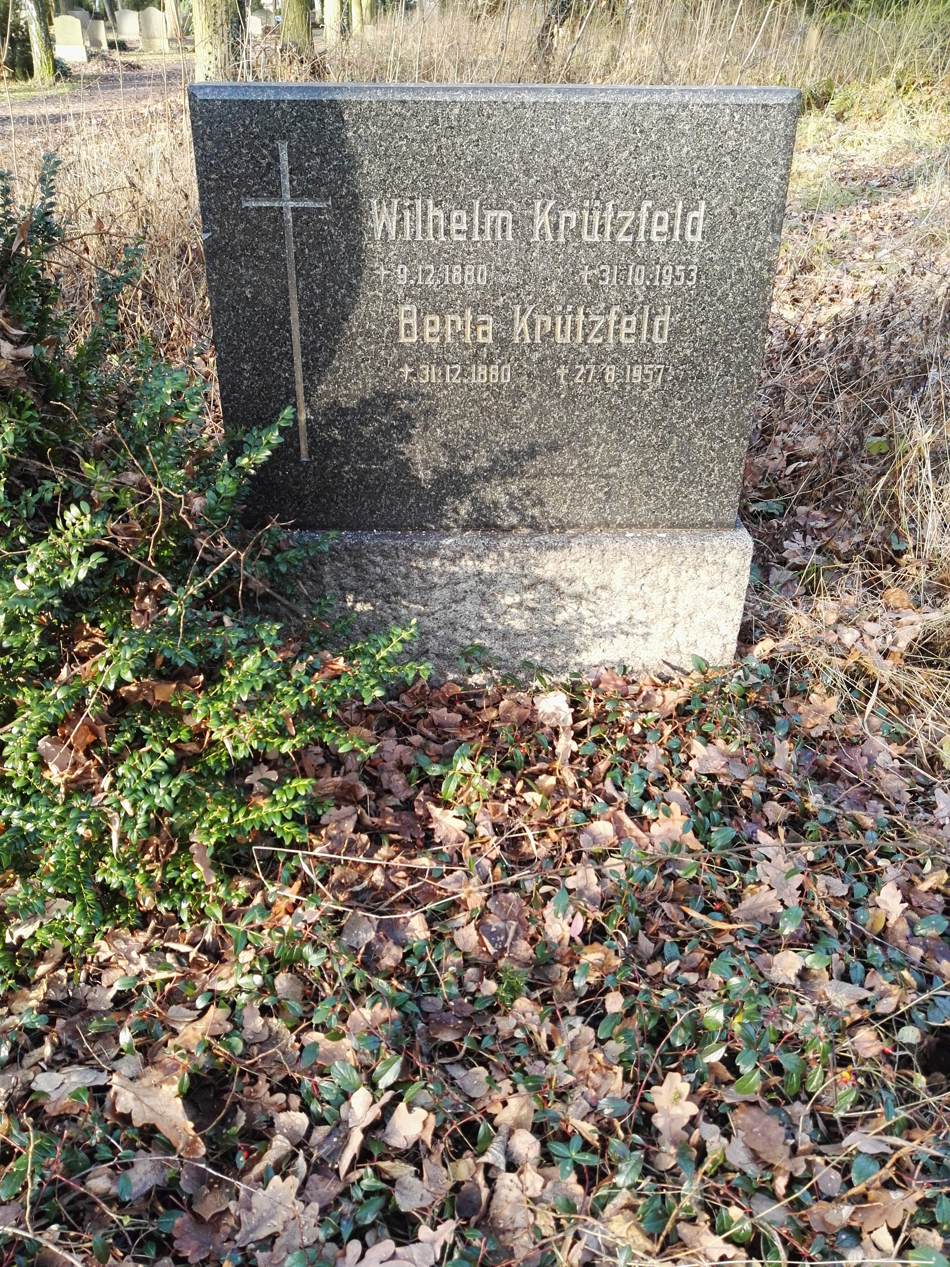 Grab von Wilhelm Krützfeld auf dem Georgen-Parochial-Friedhof III in Berlin-Pankow; Ehrengrab der Stadt Berlin